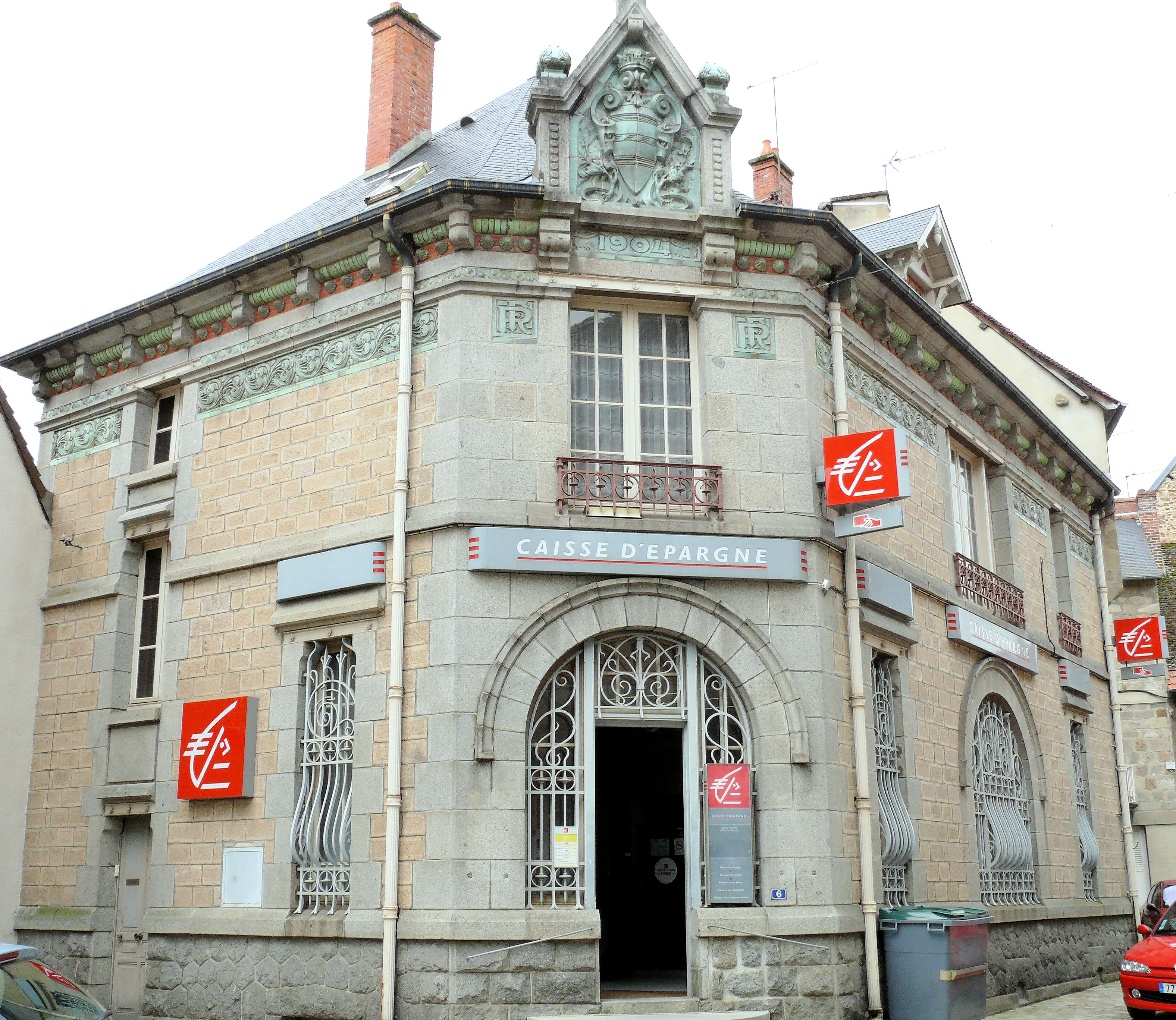 Felletin - Caisse d'Epargne